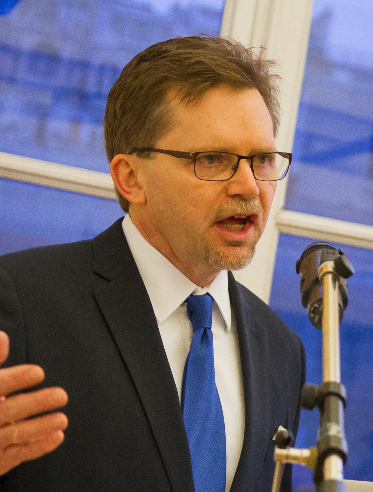 Le 9 février 2015, Lancement de la chaire du Centre de Gestion scientifique (CGS) « Théorie de l’entreprise Modèles de gouvernance & création collective » en présence notamment de Kent GREENFIELD, du Boston College.